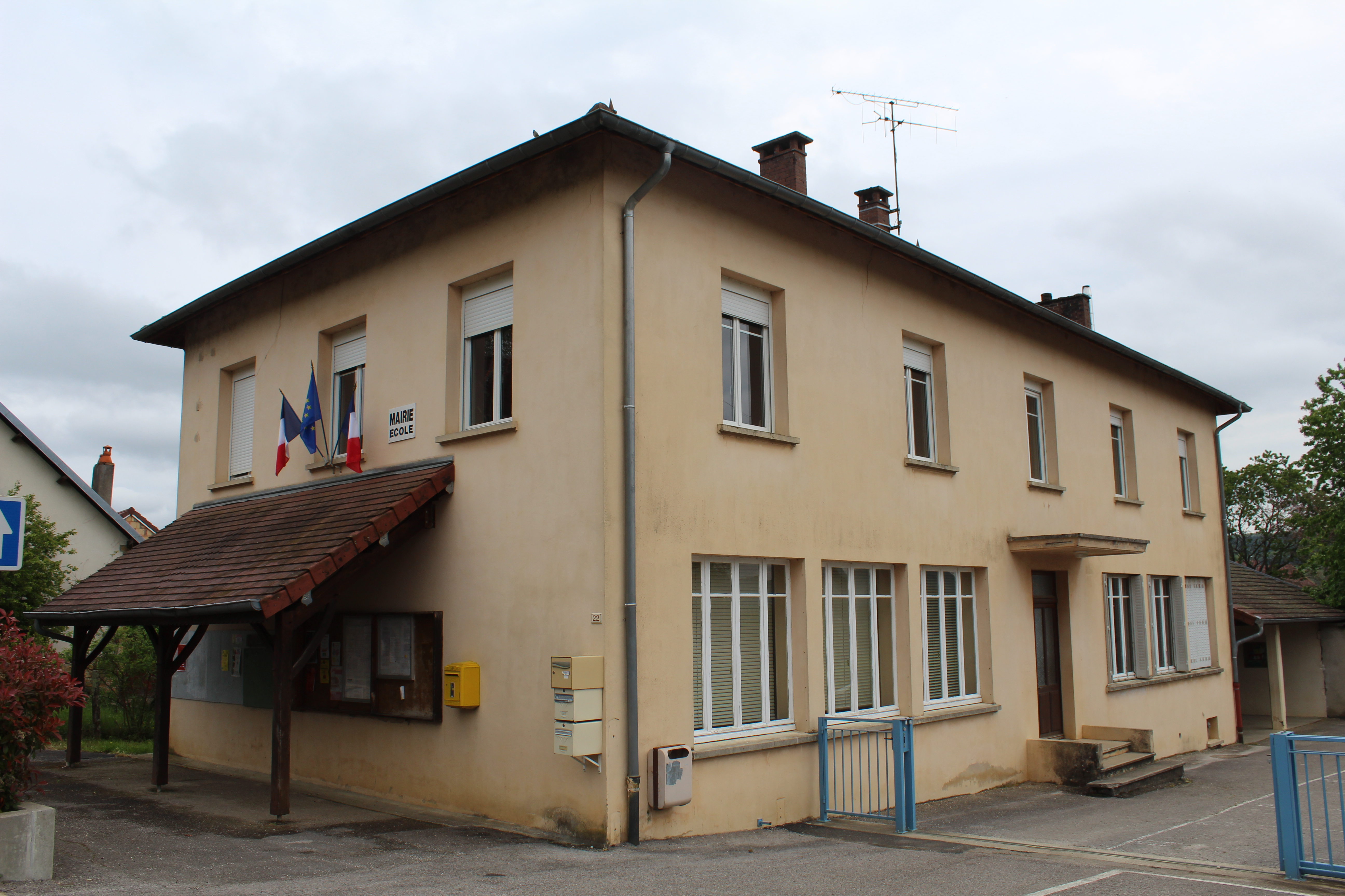 Église Saint-Laurent de Bréry.